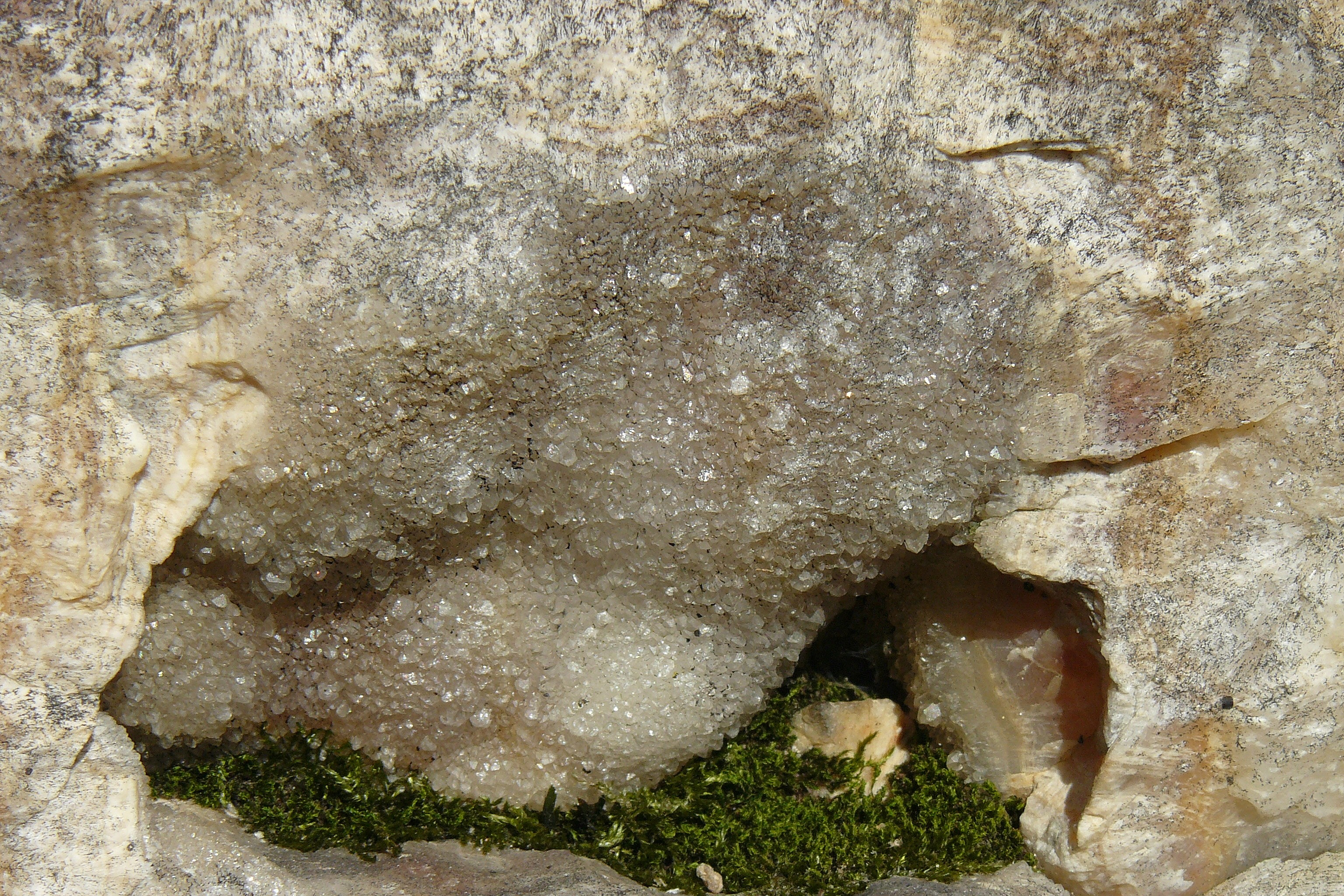 Roche-d'Agoux (Puy-de-Dôme, France) : le piton de quartz (détail).